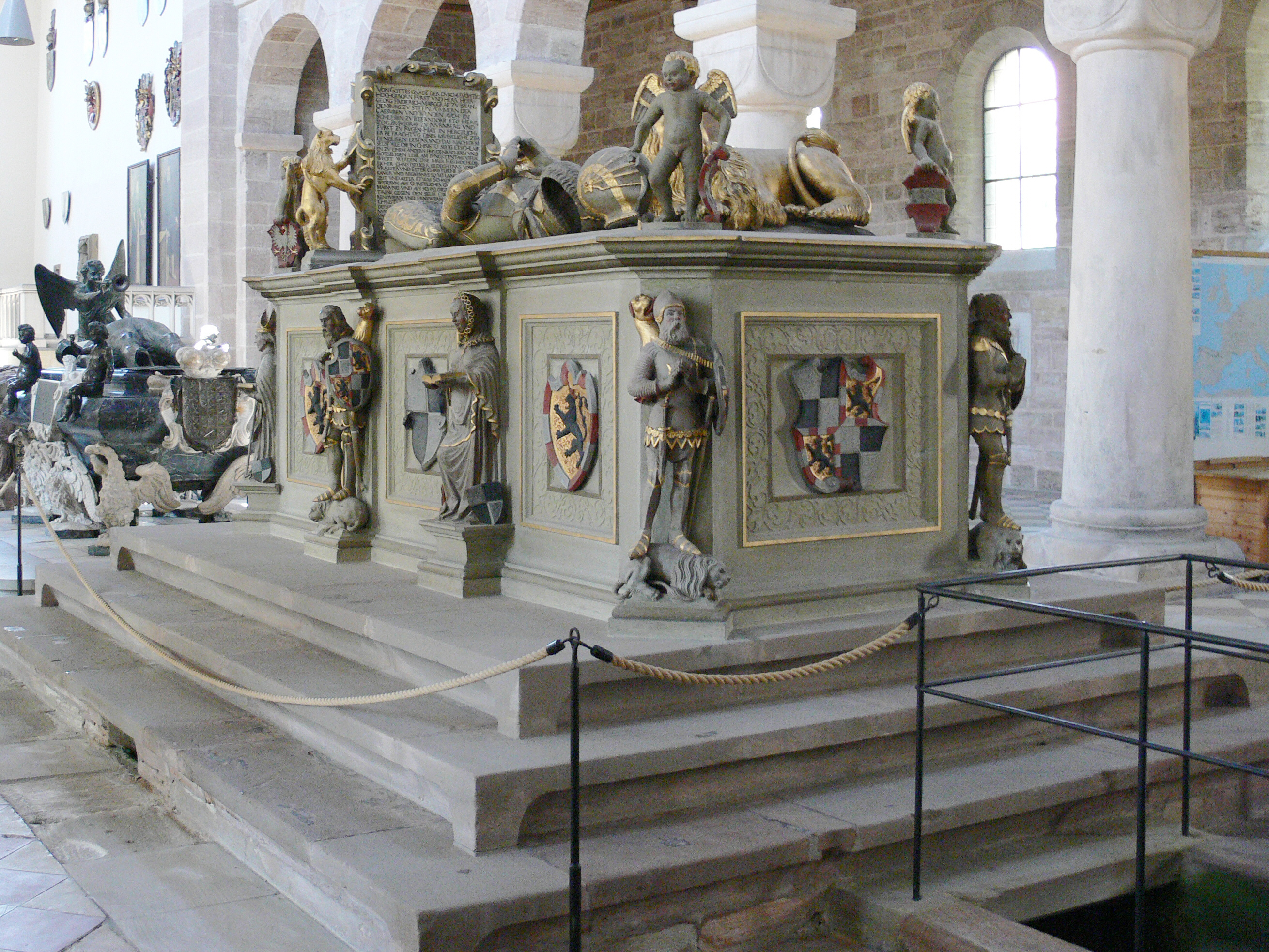 Heilsbronn, Münster St. Marien und Jakobus Grabmal des Markgrafen Georg Friedrich I. (des Älteren), † 1603